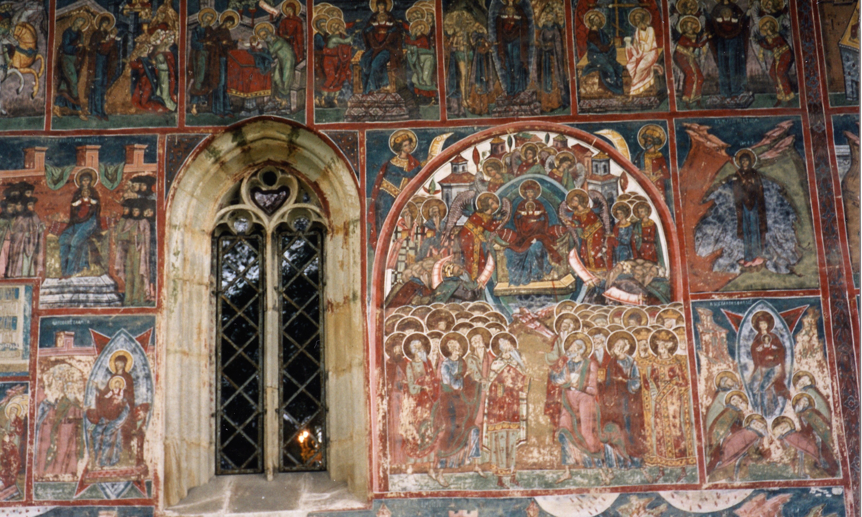 Szűz Mária Mennybemenetele-templom, falkép a déli falon (Humor, Románia)